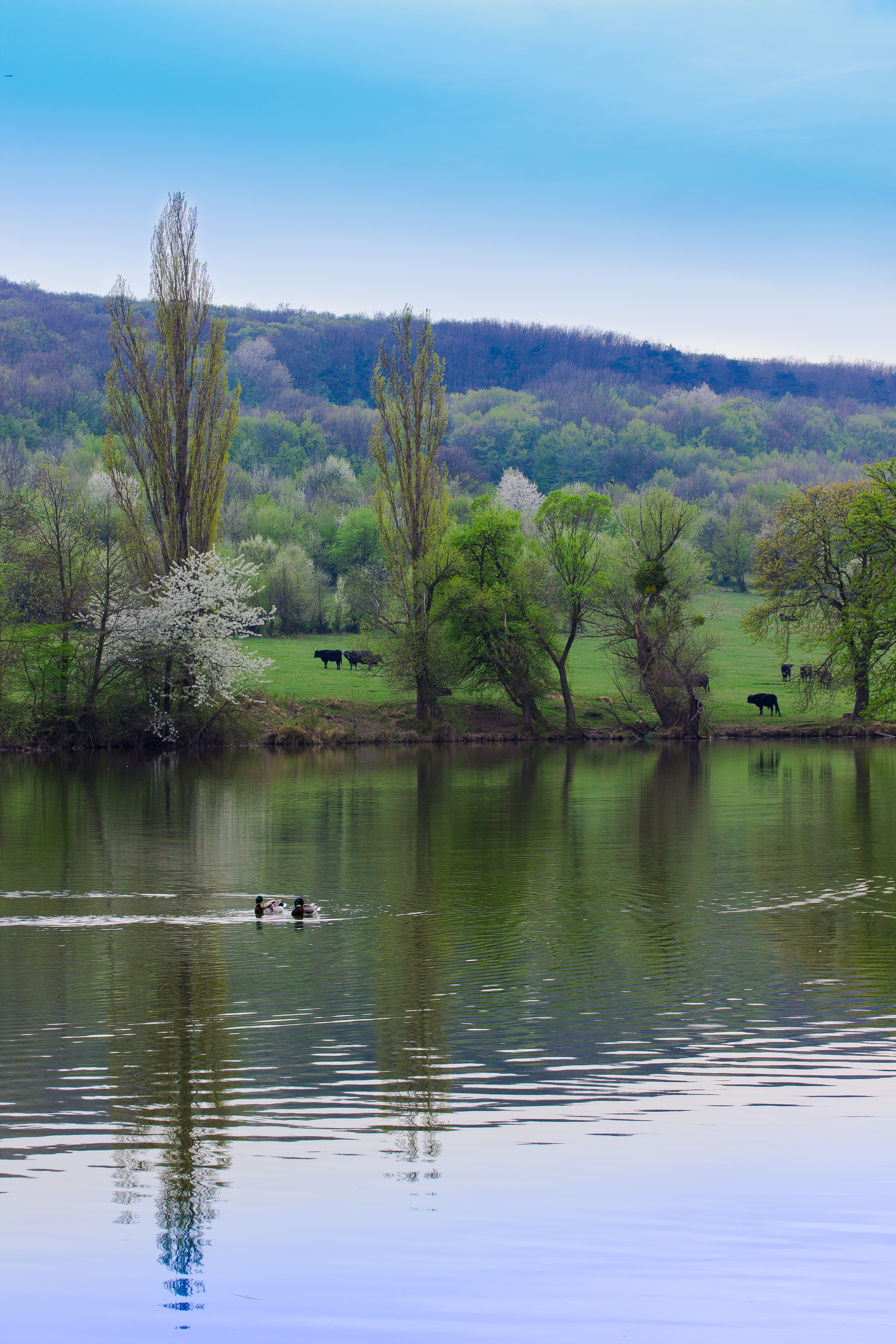 Im östlichen Teil des Lainzer Tiergartens This media shows the nature reserve in Vienna with the ID 1.